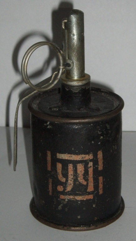 Учебно-тренировочная граната РГ-42